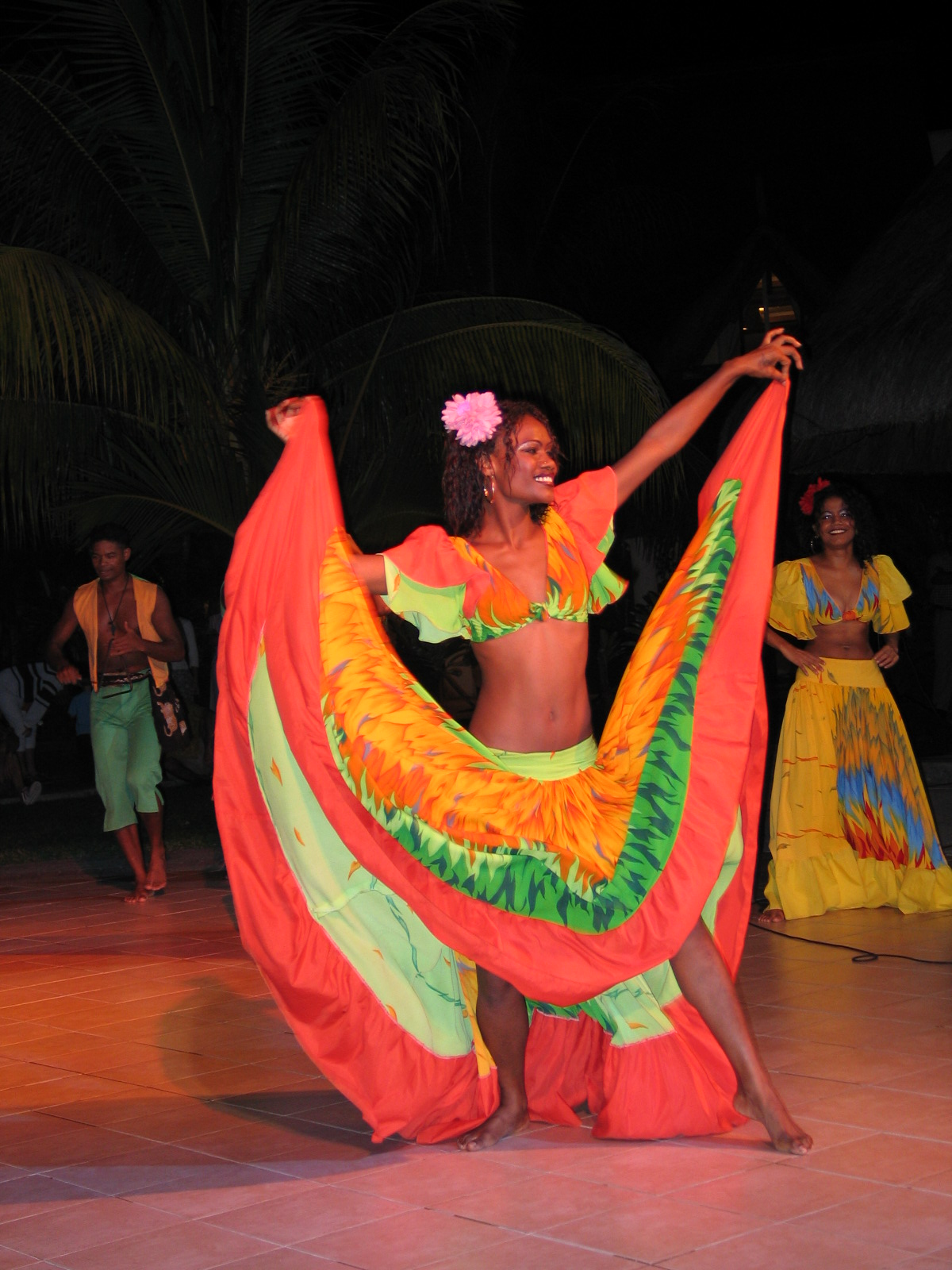 Sega dancer in Mauritius